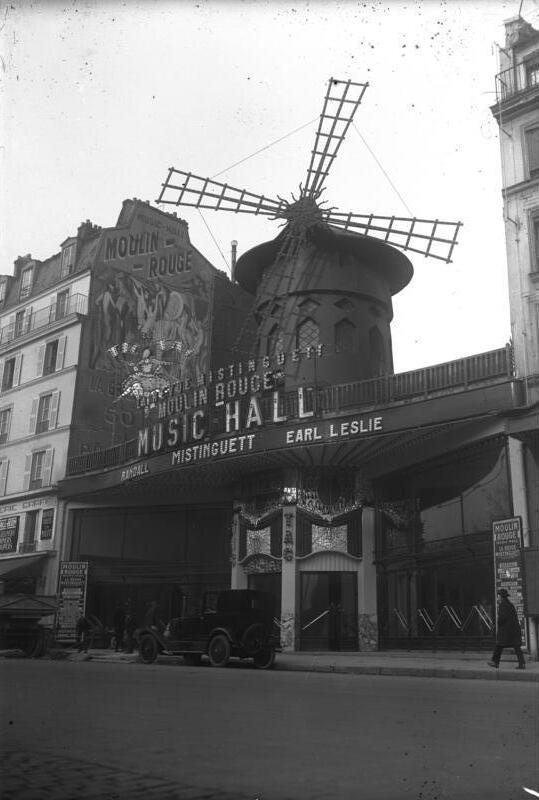 Das weltberühmte Cabaret Moulin Rouges wird Tonfilmkino! Der Siegeszug des Tonfilms hat auch dem weltberühmten Cabaret Moulin Rouges auf dem Montmartre in Paris ein Ende gemacht. Das Cabaret wird in ein Tonfilm-Kino umgebaut.